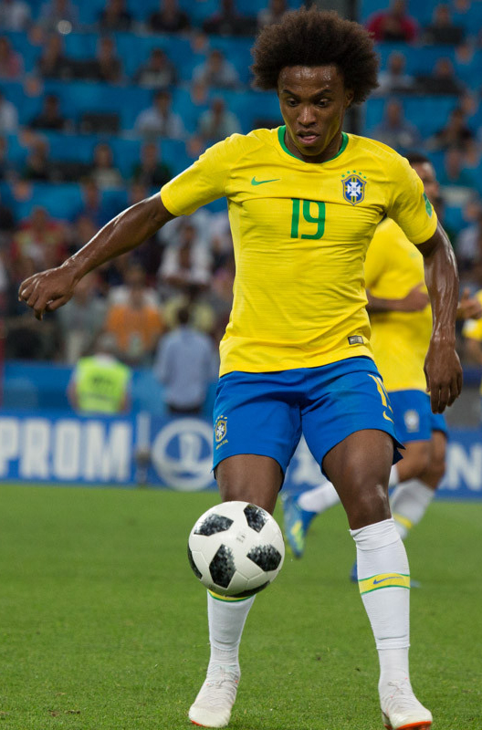 Сборная Бразилии оставляет Сербию за бортом ЧМ-2018 и выходит в плей-офф